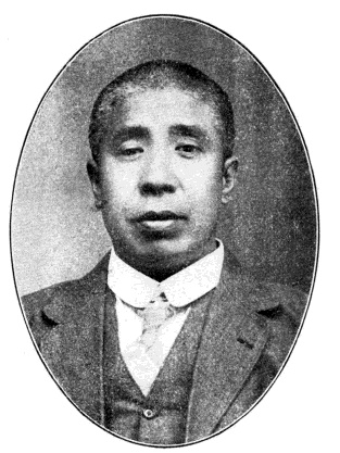 中華民國國會議員